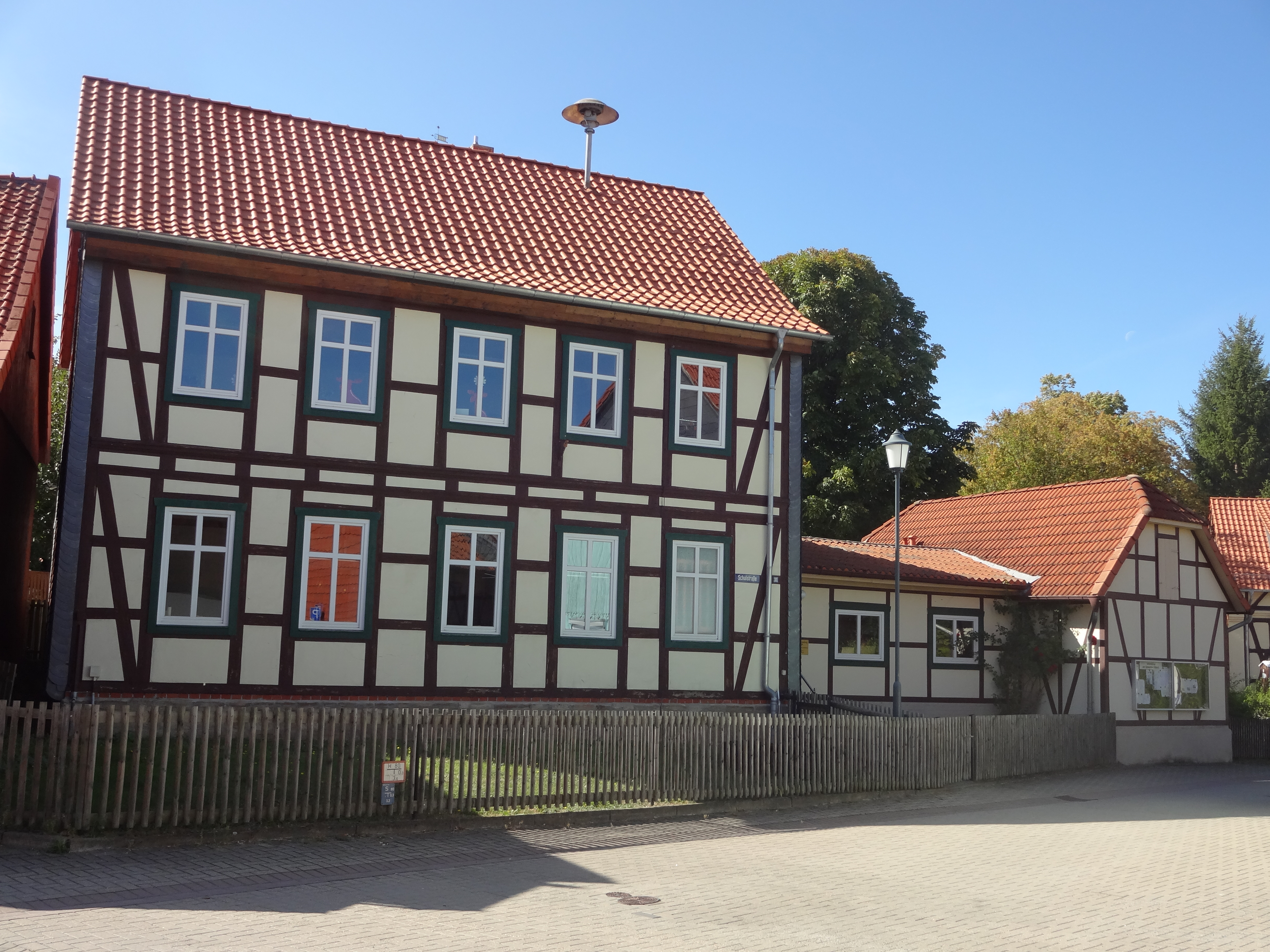 denkmalgeschützter Straßenzug Schulstraße 3-14 in Drübeck